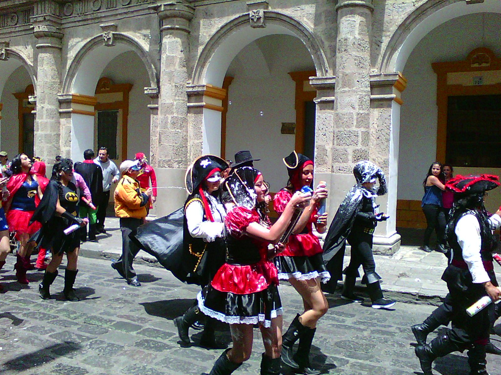 Desfile de carnaval en las calles de Latacunga y su paso frente al palacio municipal, fotografía captada por Alfonso Chuquitarco ideador de La Gran Latacunga.